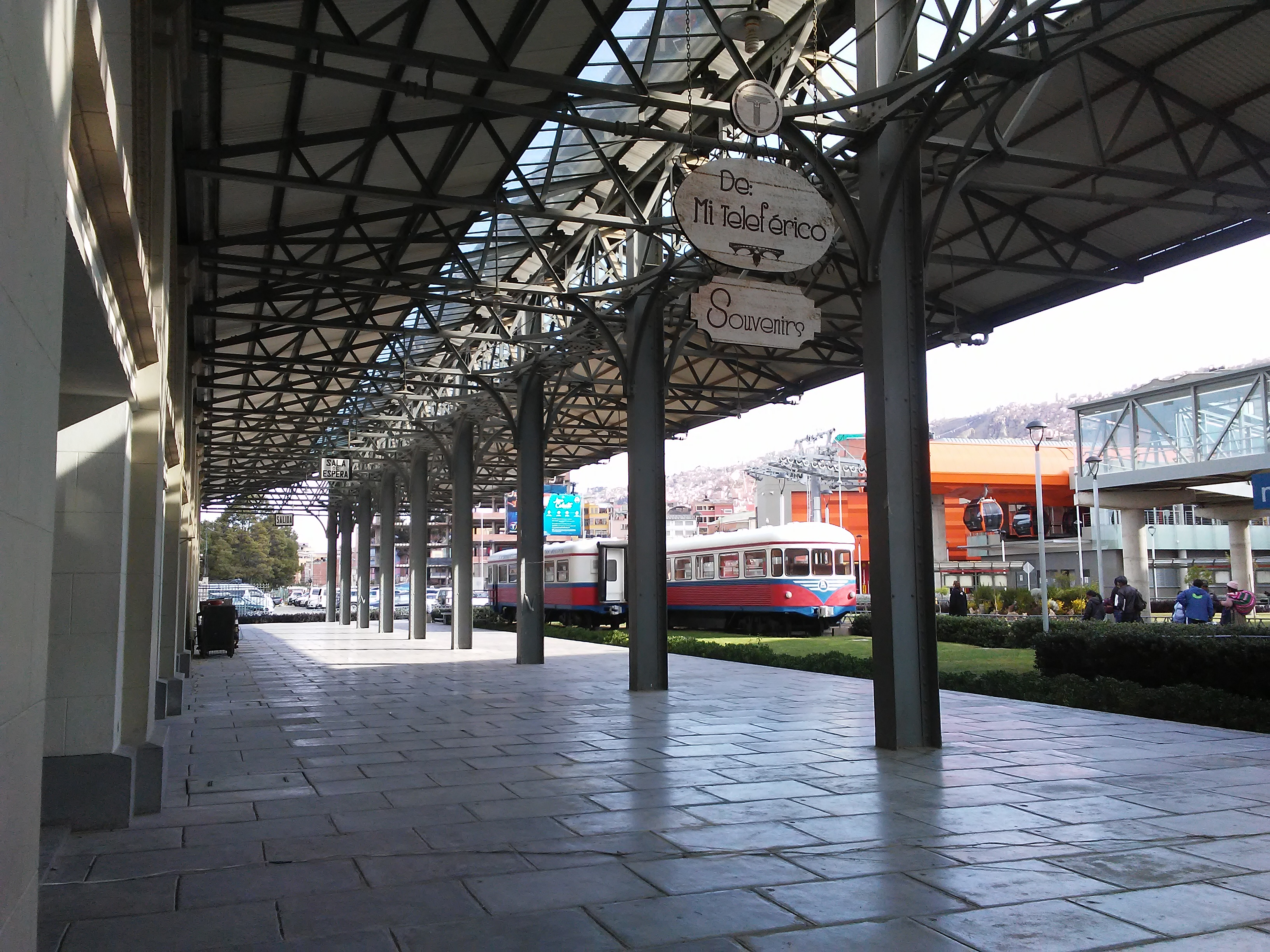 Estación ENFE This medium shows the protected monument with the number L/00-001 in Bolivia.